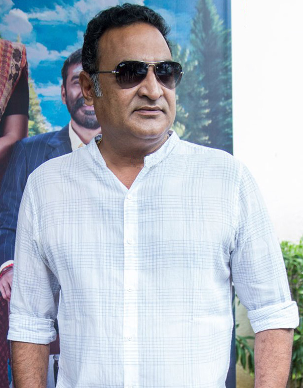 Aadukalam Naren At The ‘Asuran’ Audio Launch